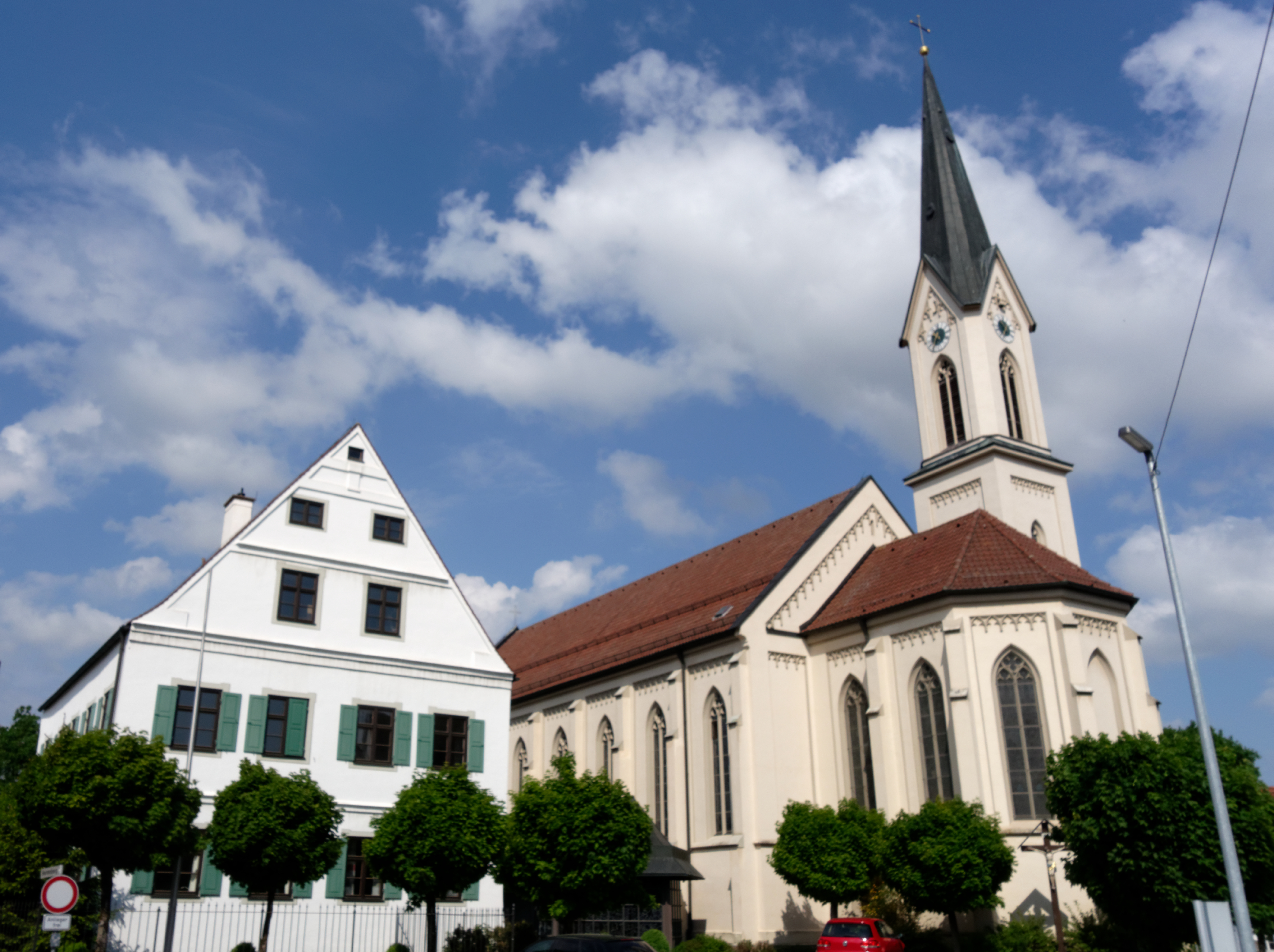 St. Michael und Pfarrhof in Ottmaring bei Friedberg (Bayern)